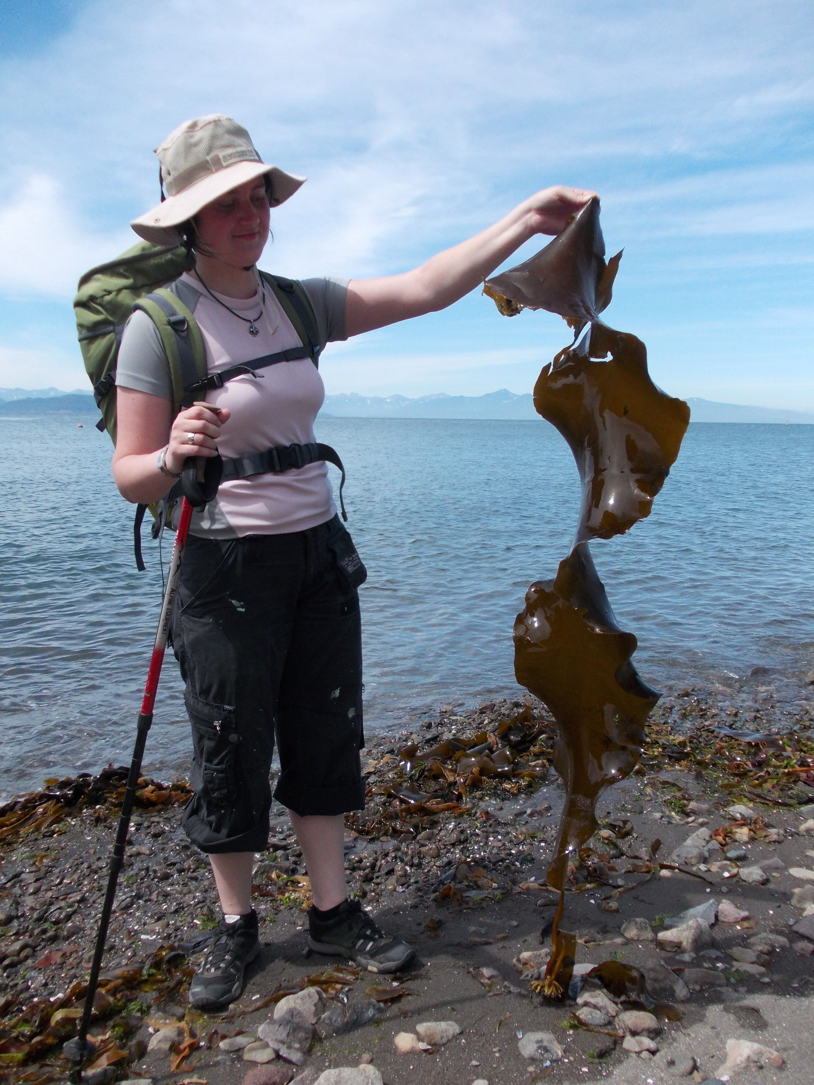 Ламинария Сахаристая (Laminaria cukrowa - Laminaria saccharina) znaleziona w Zatoce Awaczyńskiej